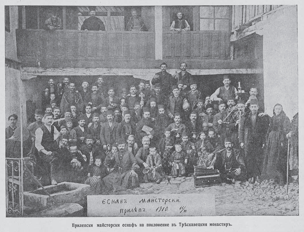 Treskavets Monastery